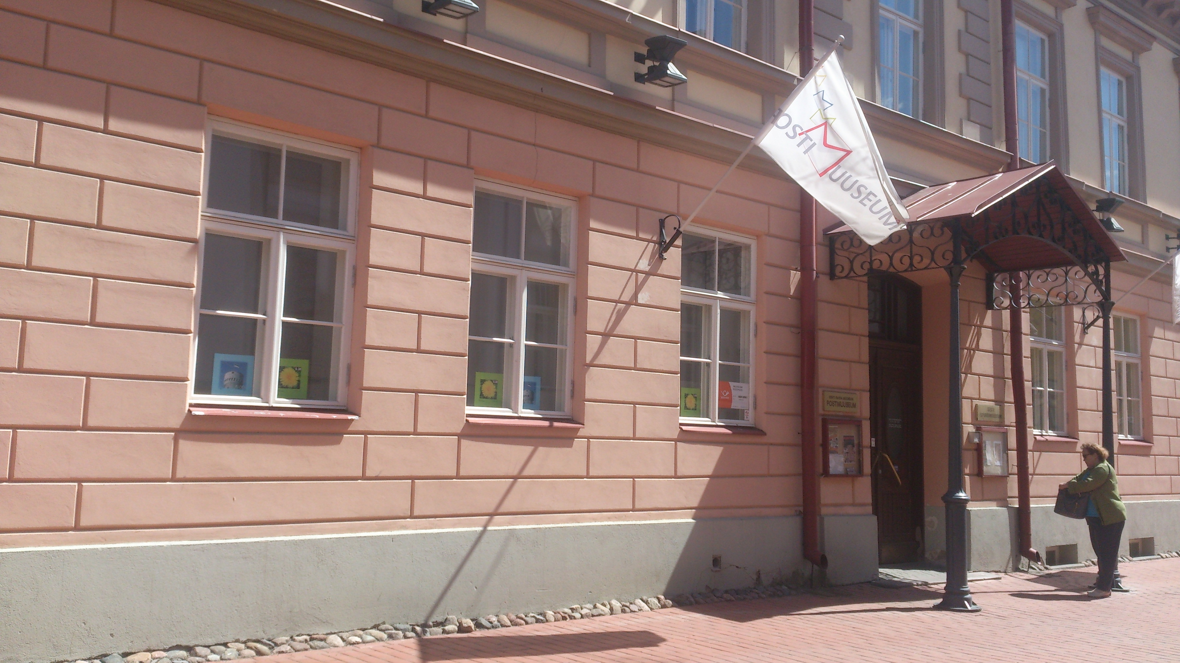 Eesti Rahva Muuseumi Postimuuseum Tartus Rüütli tänaval, juuni 2015